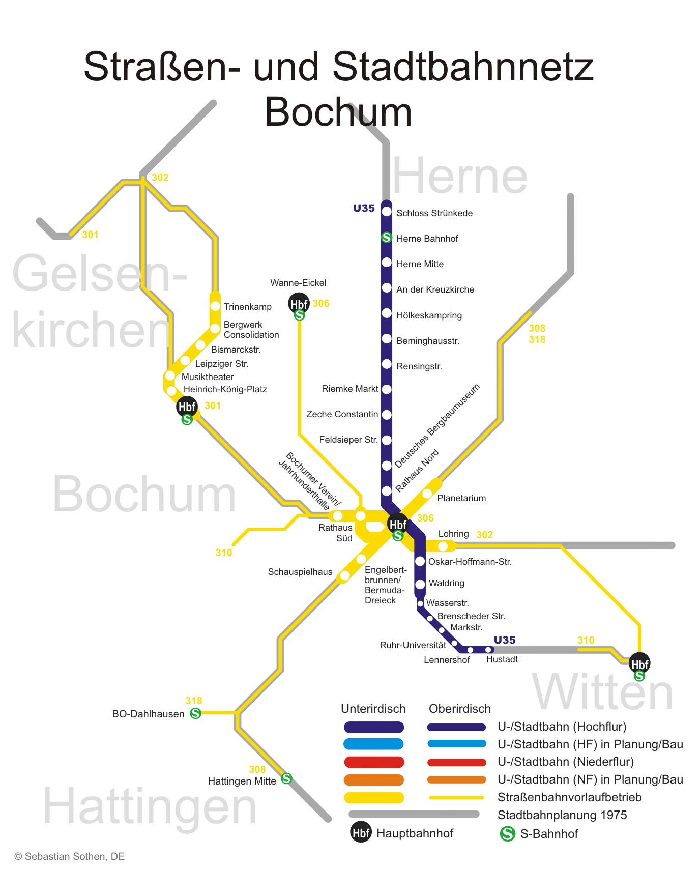 Stadtbahnnetz Bochum